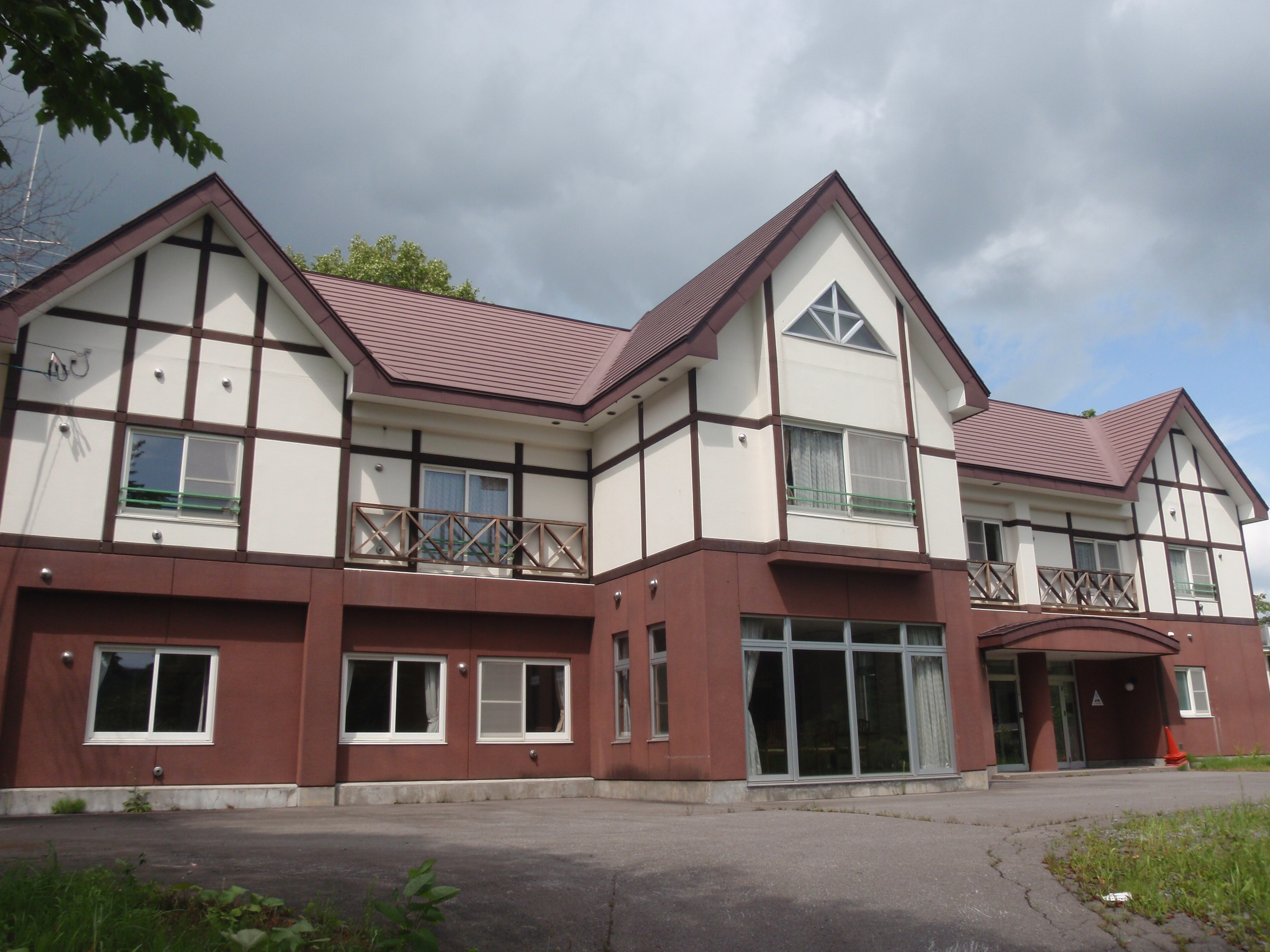 北湯沢ユースホステル、休館中に撮影。